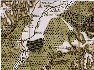 Carte Cassini de Beauvoisin Auteur : R. BENEZET